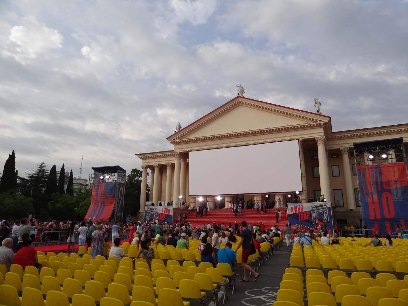 Церемония открытия фестиваля "Кинотавр -2014" в Сочи. Зимний театр.